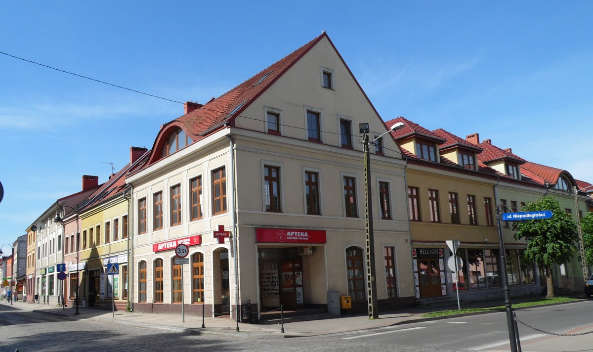 Apteka w zabytkowej kamienicy.